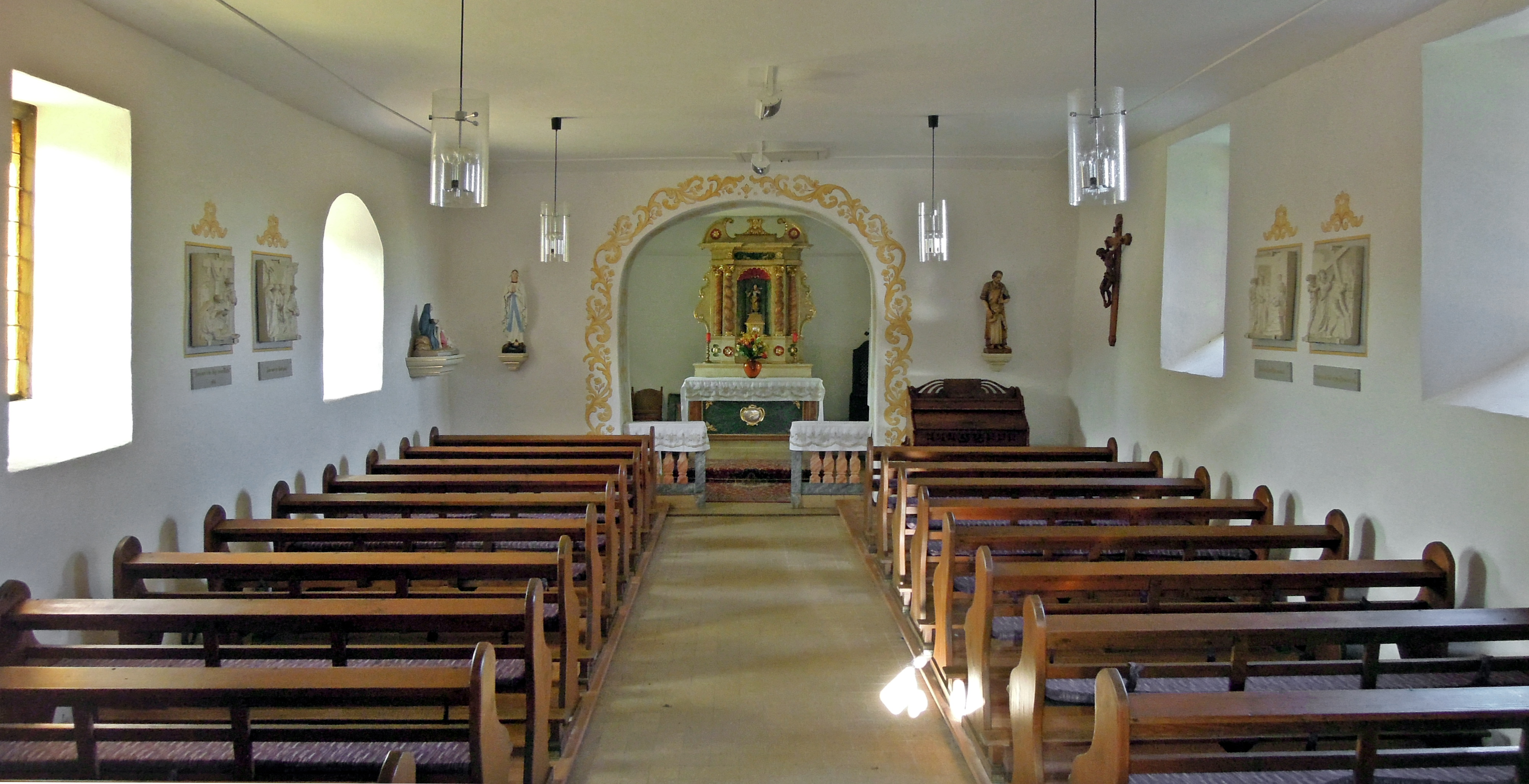 Innenansicht